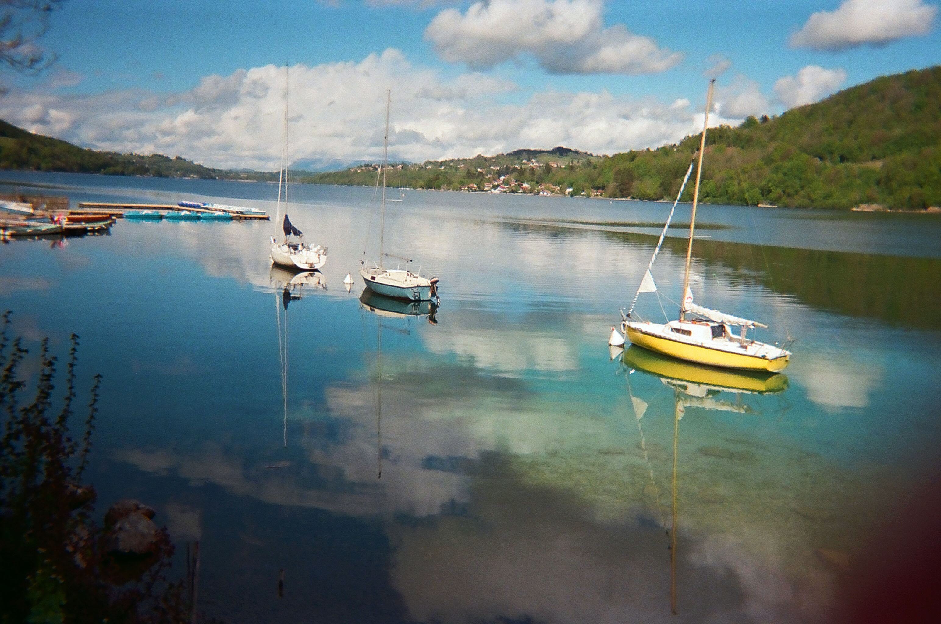 le lac de paladru en mai 2017